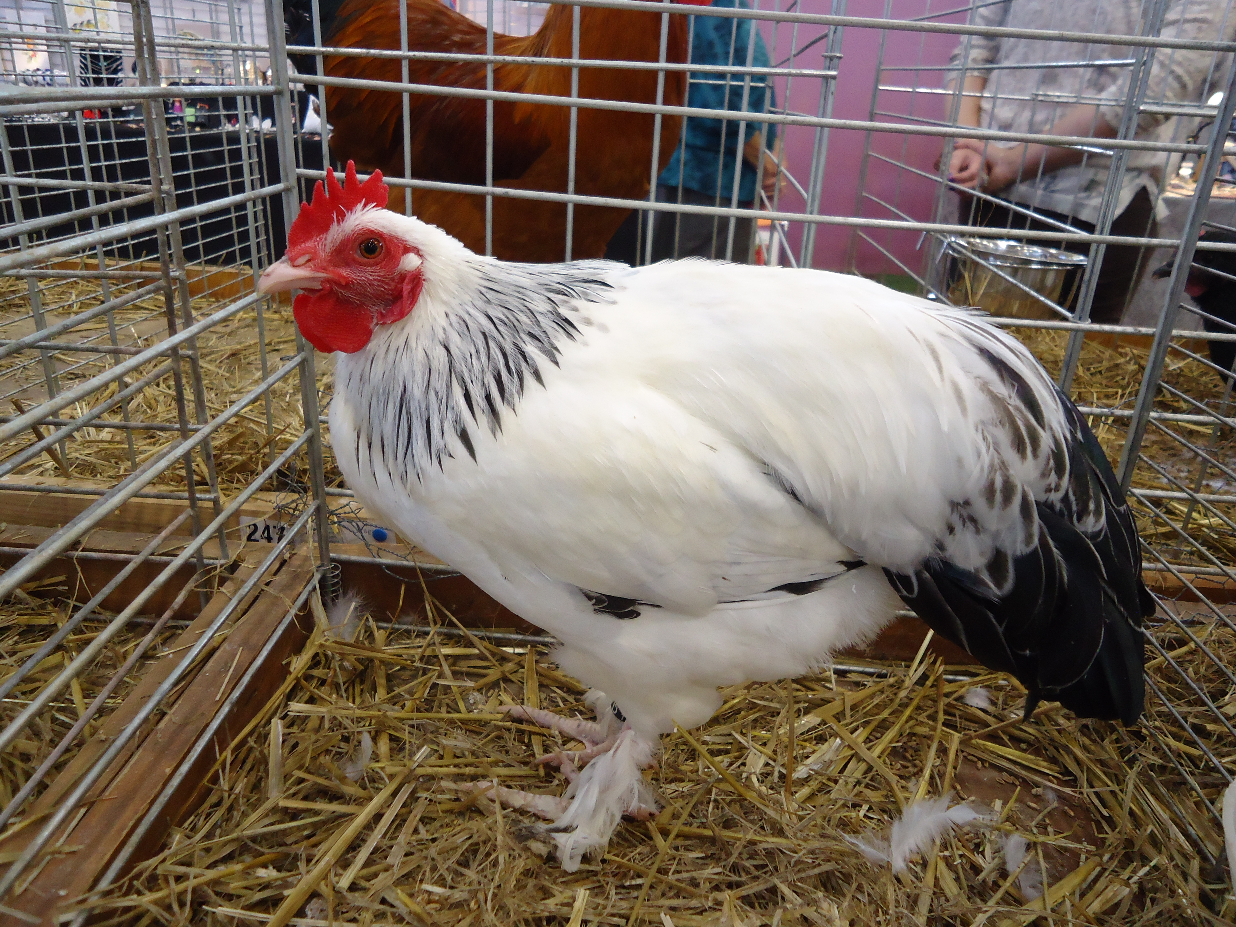 Coq de Sundheim